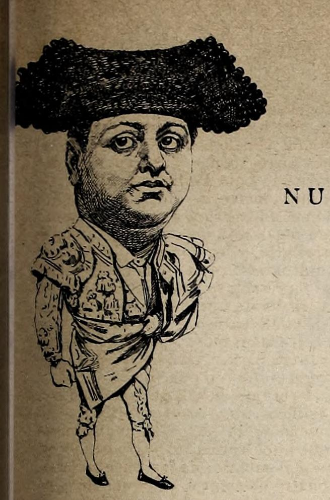 Los hombres del día. Nuestros toreros (primera serie).